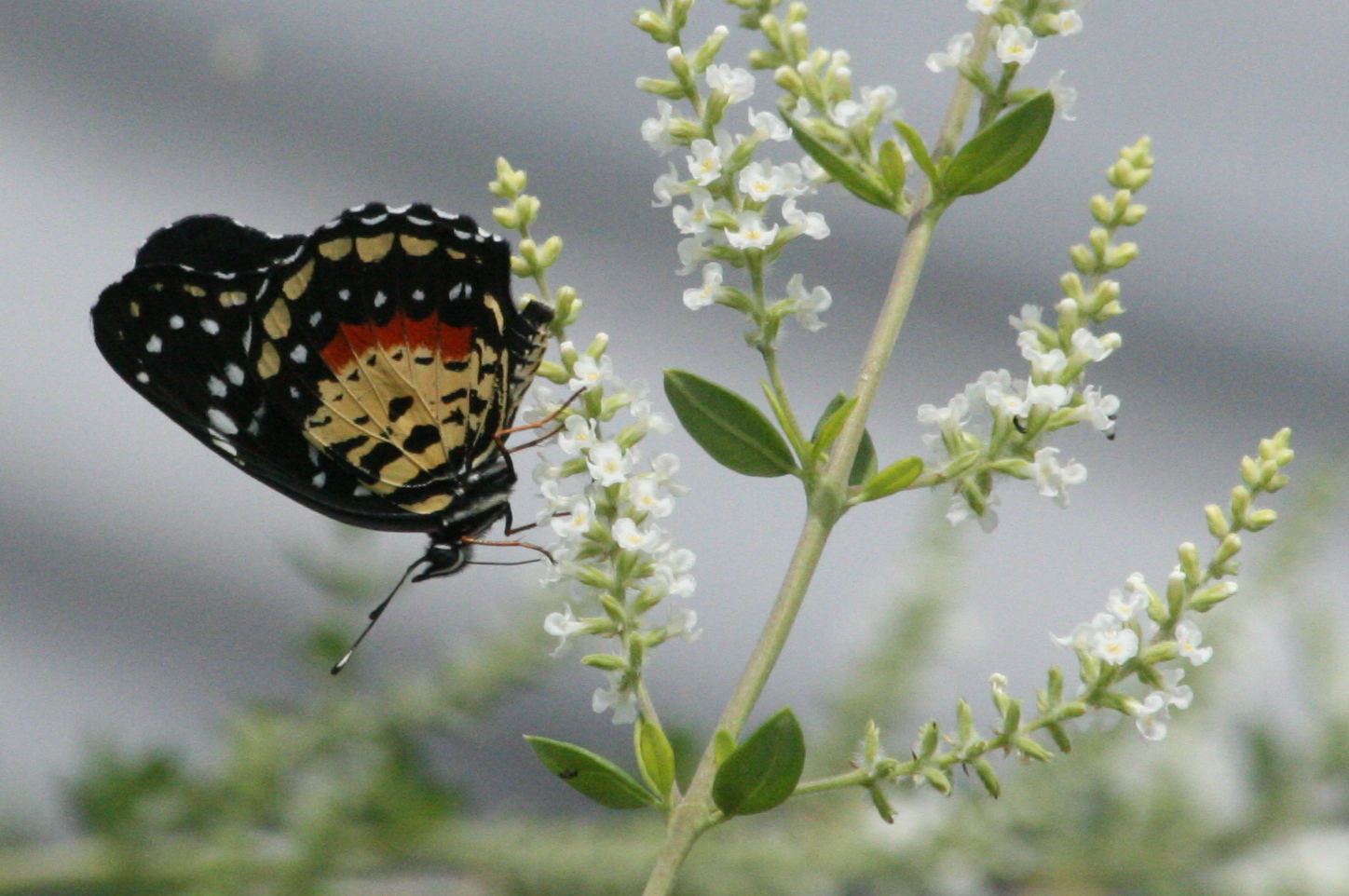 Crimson patch (Chlosyne janais)